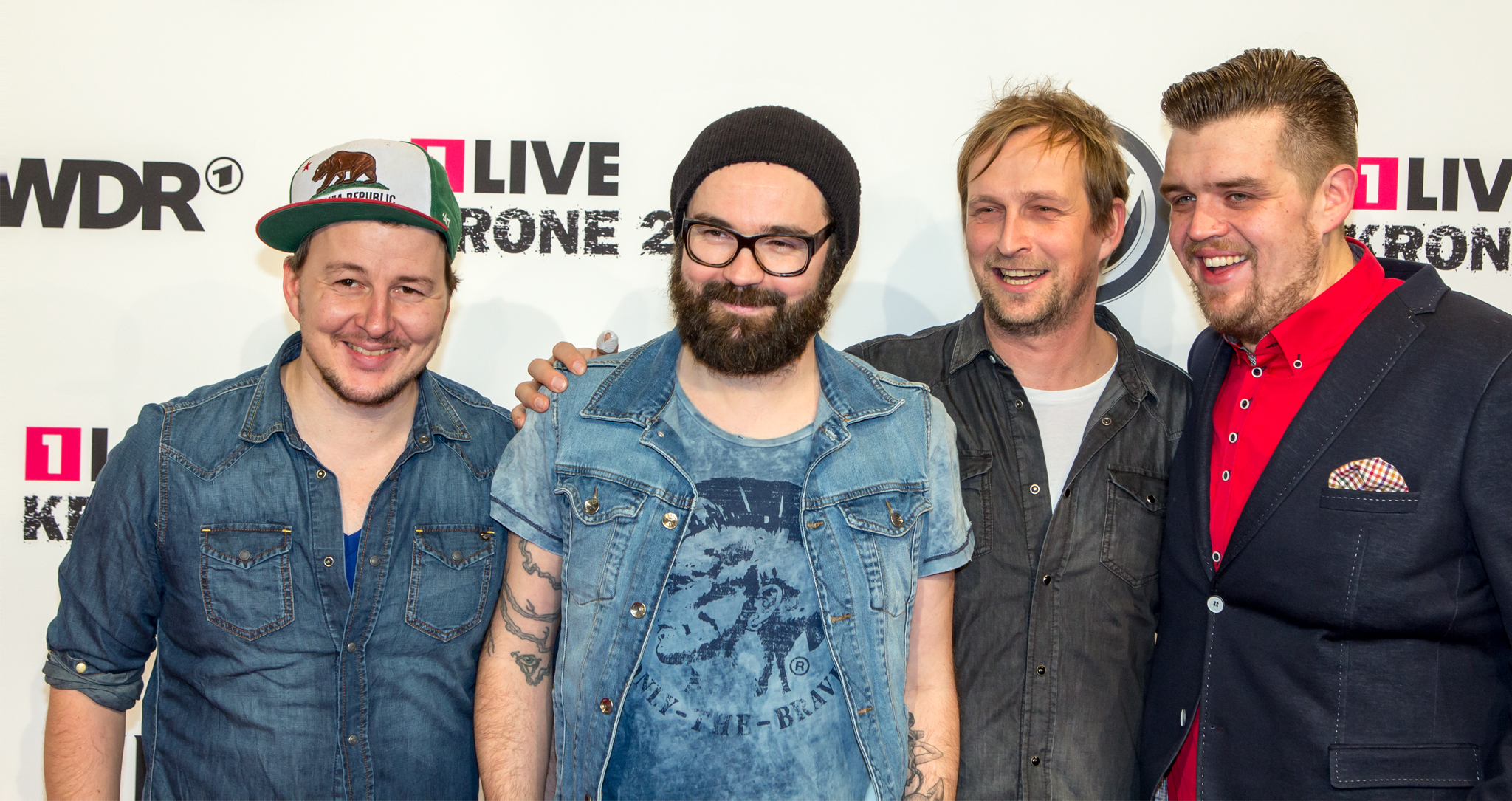 1LIVE Krone 2013: Jupiter Jones auf dem roten Teppich